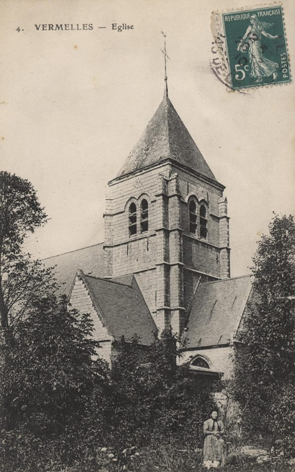 Église de Vermelles avant la Première Guerre mondiale.